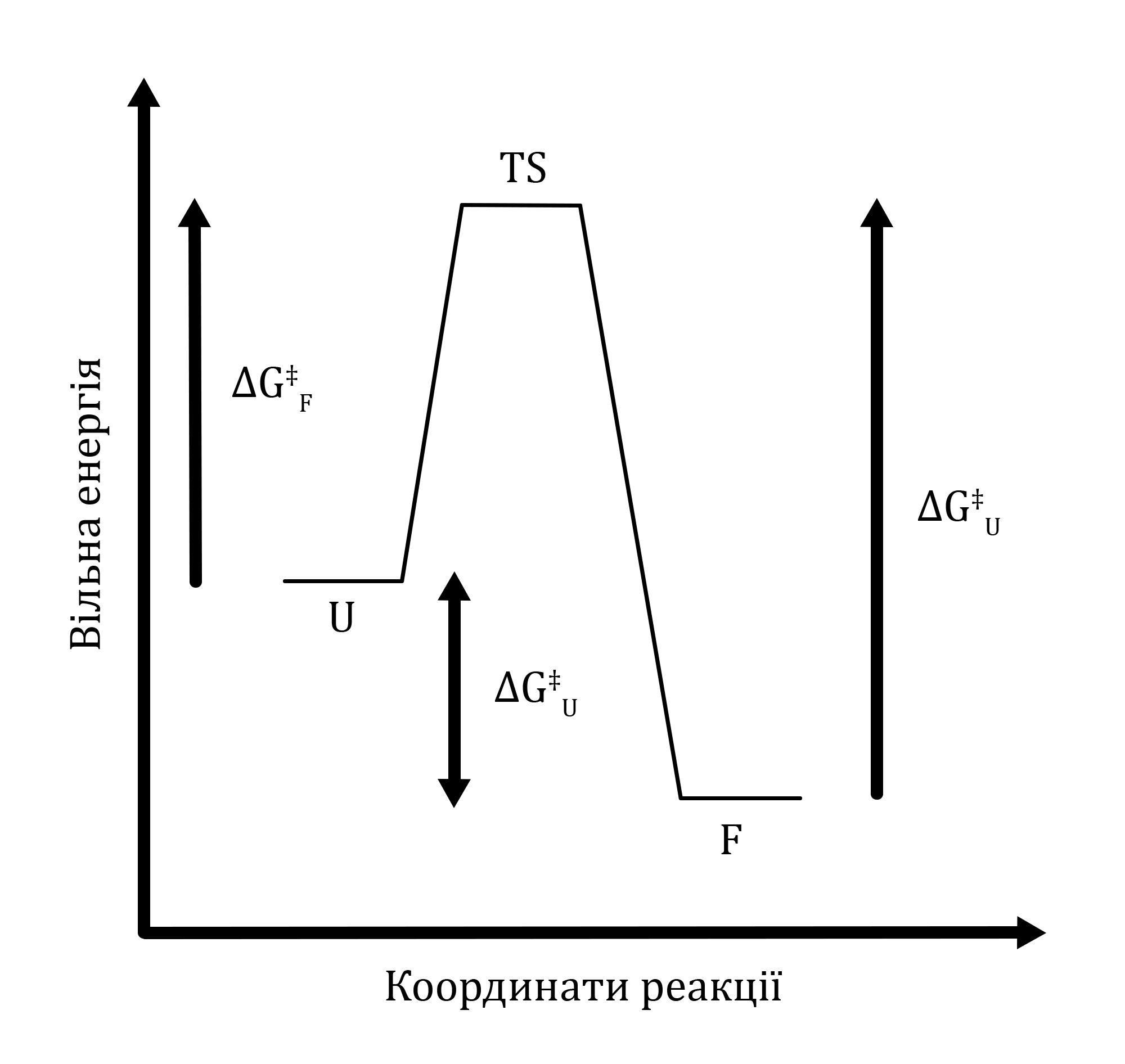 Термодинамічна стабільність білку та його вільна енергія гібса